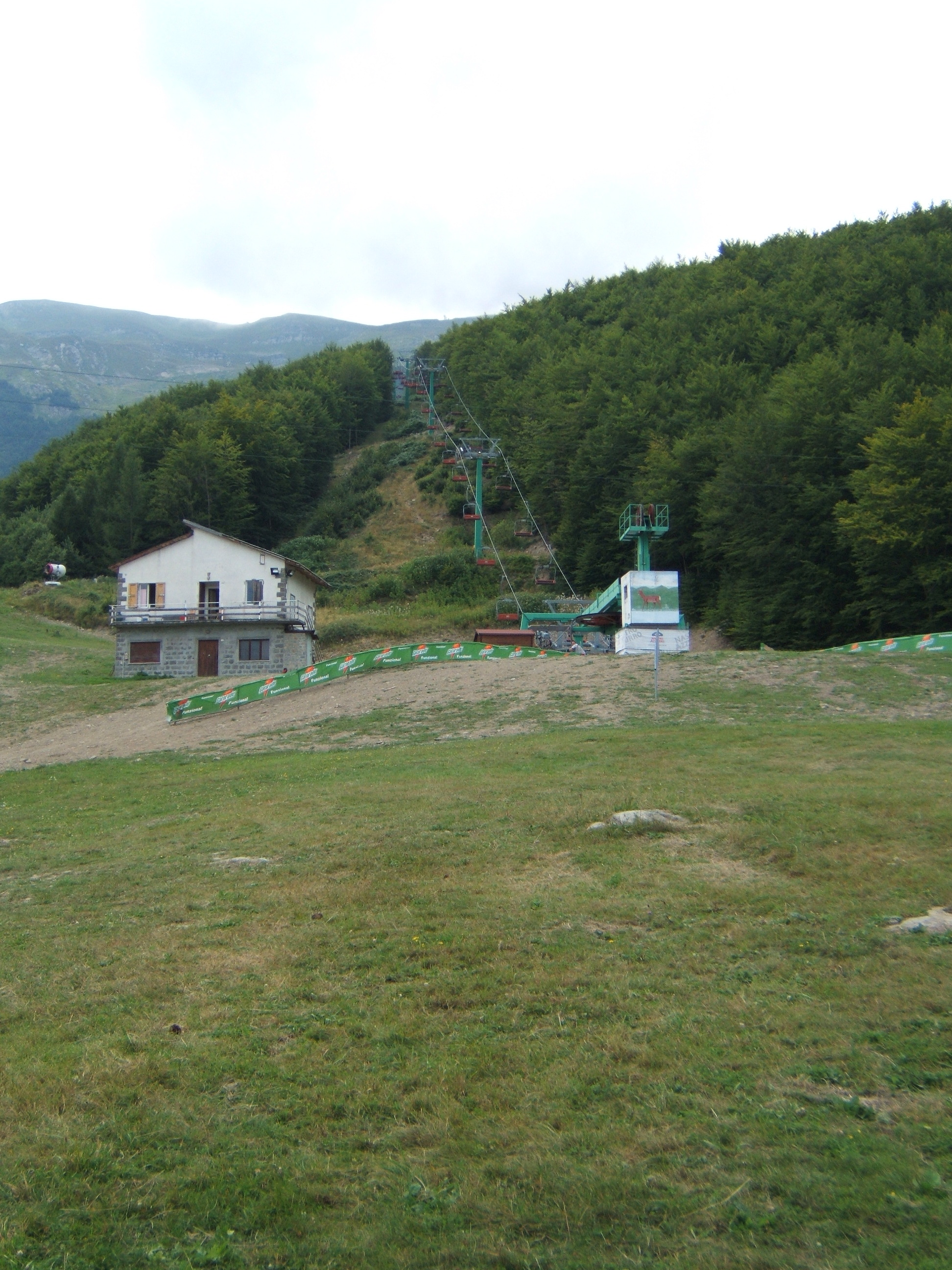 La seggiovia triposto Rescadore a Febbio de'estate.